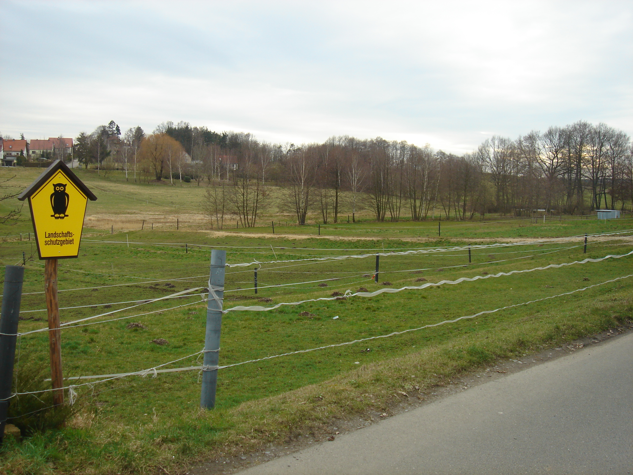 Blick von Gomlitz über das flache Muldental des Schelsbachs (Schelsaue) nach Weixdorf zum Schelsberg